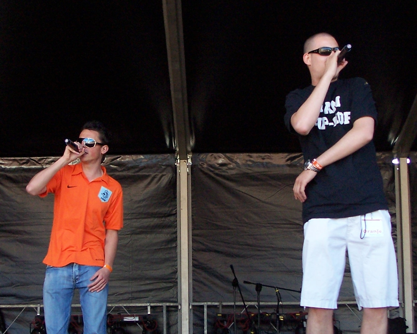 Lange Frans en Baas B, rappersduo in Nederland. Foto genomen tijdens Koninginnedag in Delft